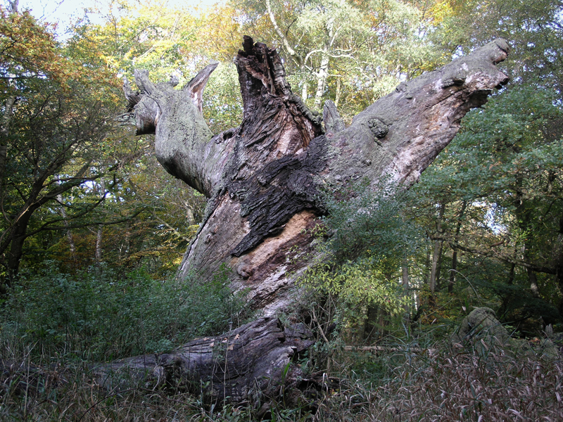 Snoegen in Øllemosen at Jægerspris